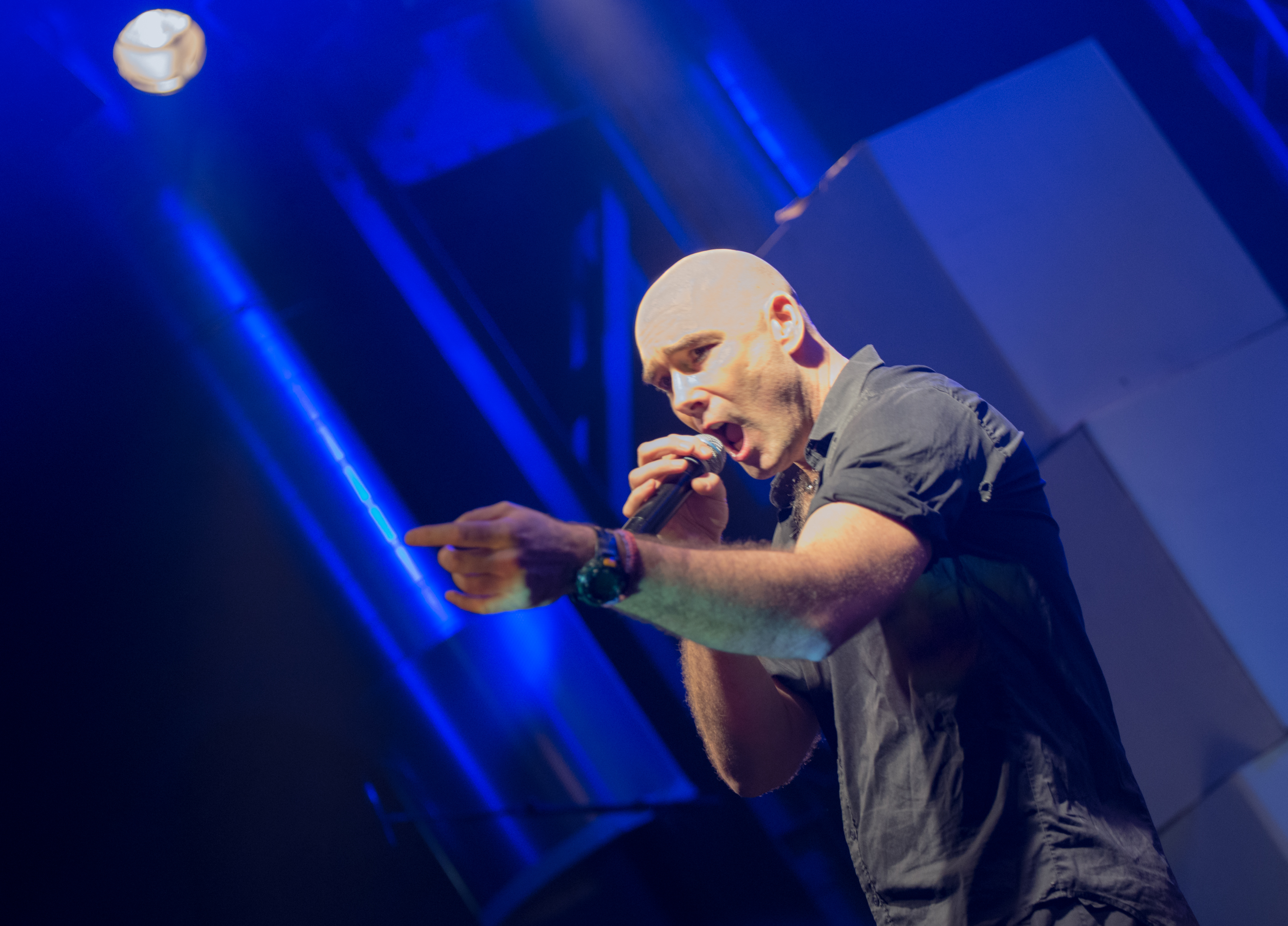 de Die Band Rotersand beim e-tropolis 2014 in Oberhausen